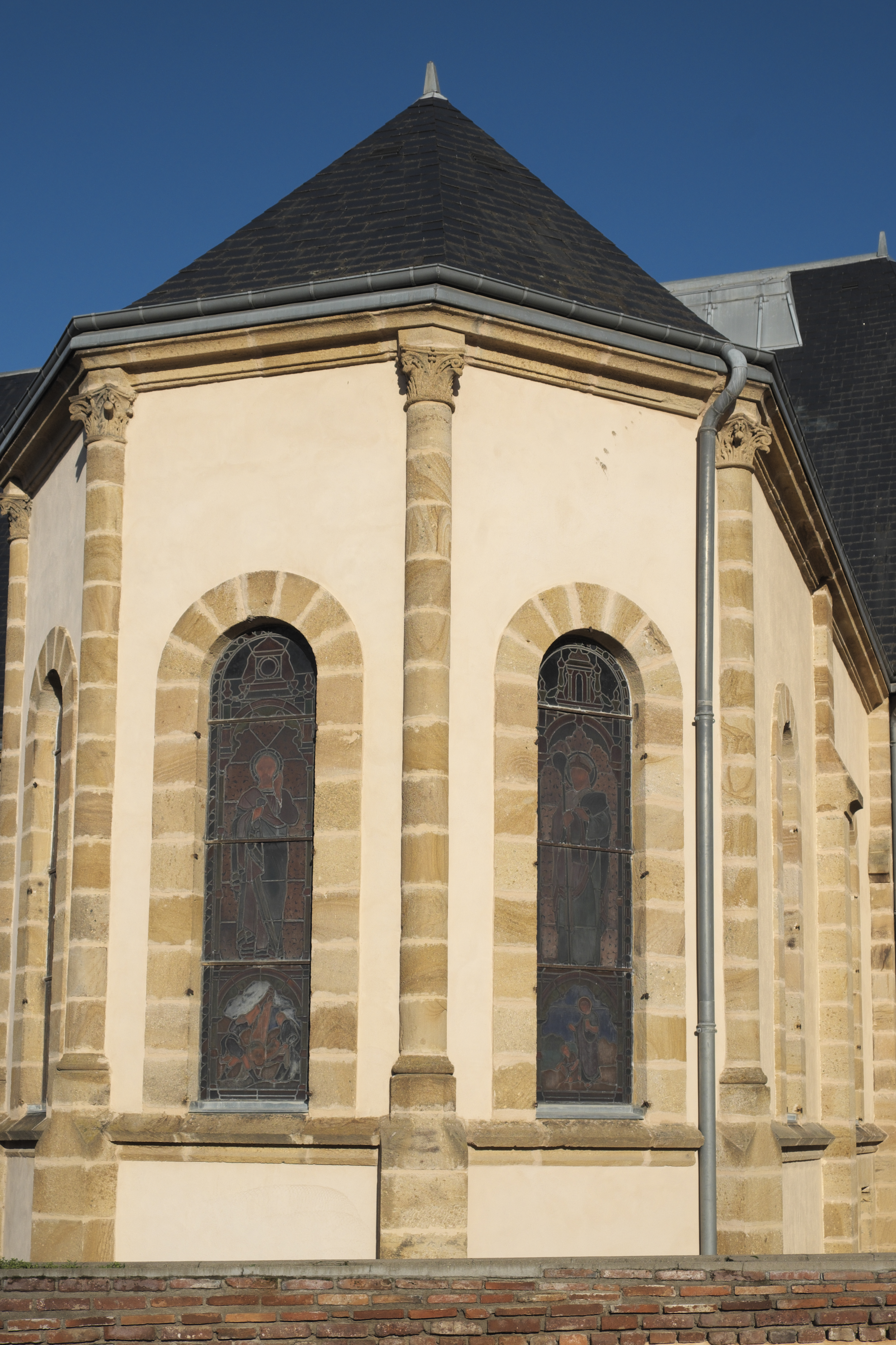 Ehemalige Kapelle Notre-Dame, heute Veranstaltungssaal des Hôtel de Paris, 21 rue de Paris, in Moulins im Département Allier (Auvergne-Rhône-Alpes/Frankreich)